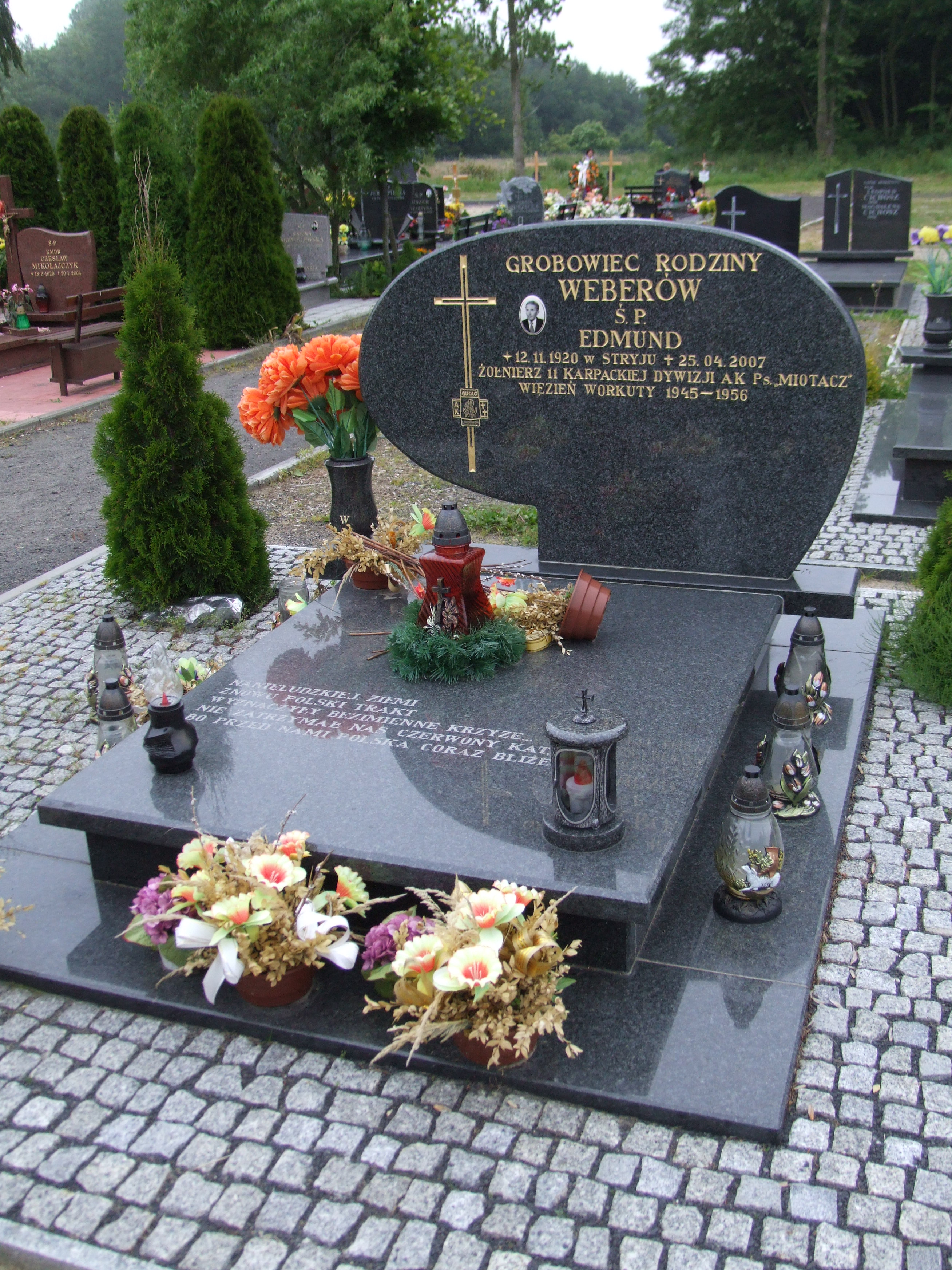 Gdynia-Oksywie Cmentarz Marynarki Wojennej